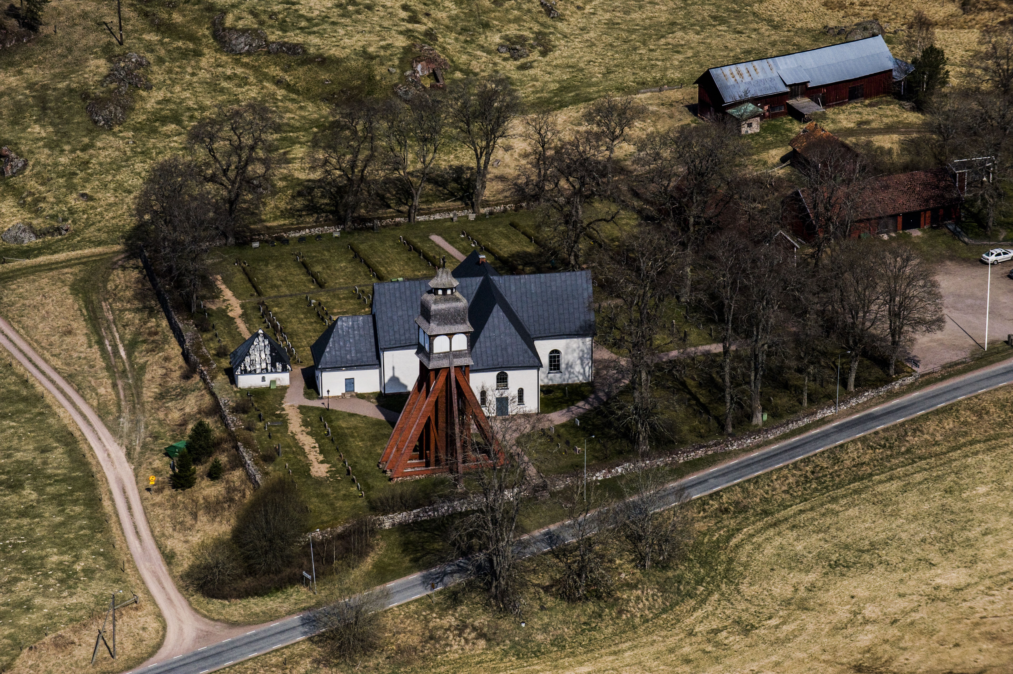 Askeryds kyrka från luften